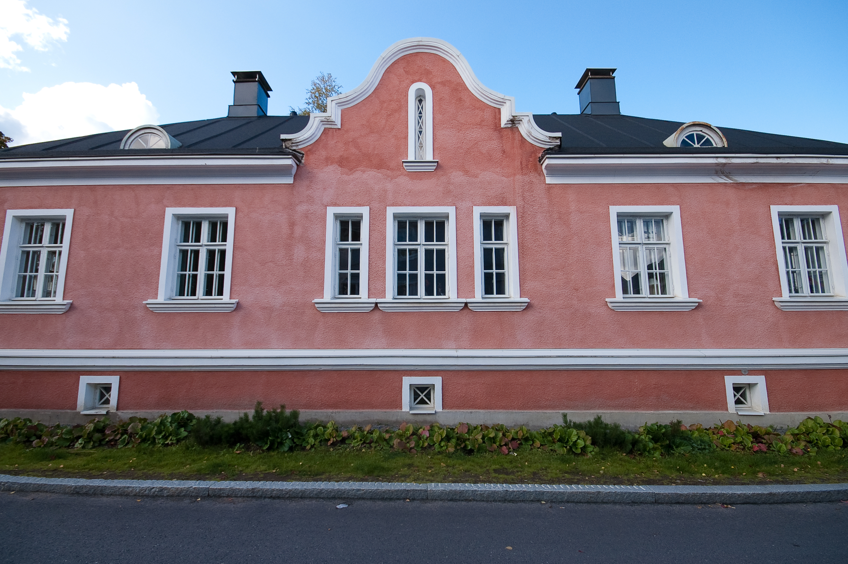 Villa Sofia